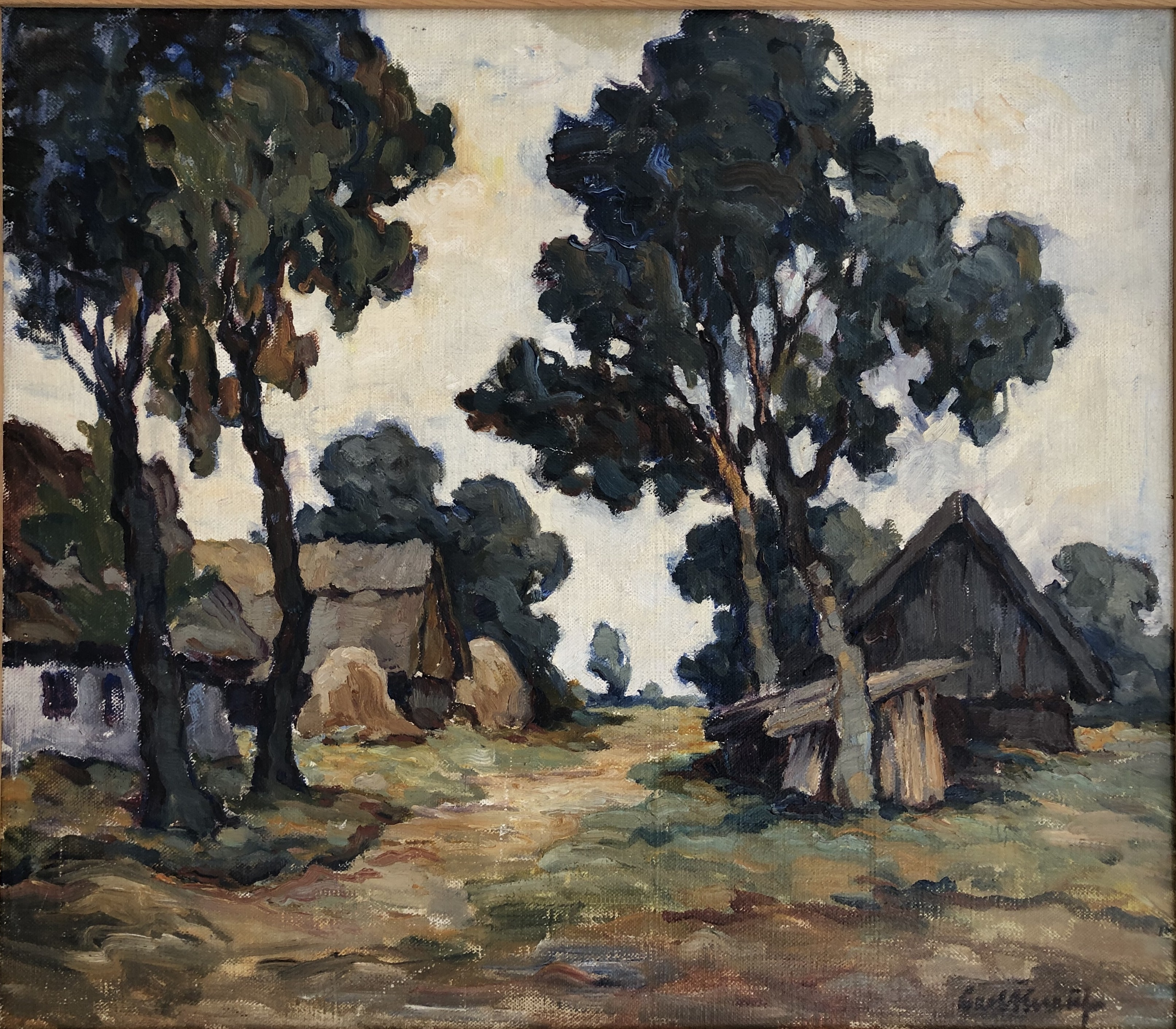 Ölgemälde ca 60x70 cm, um 1935